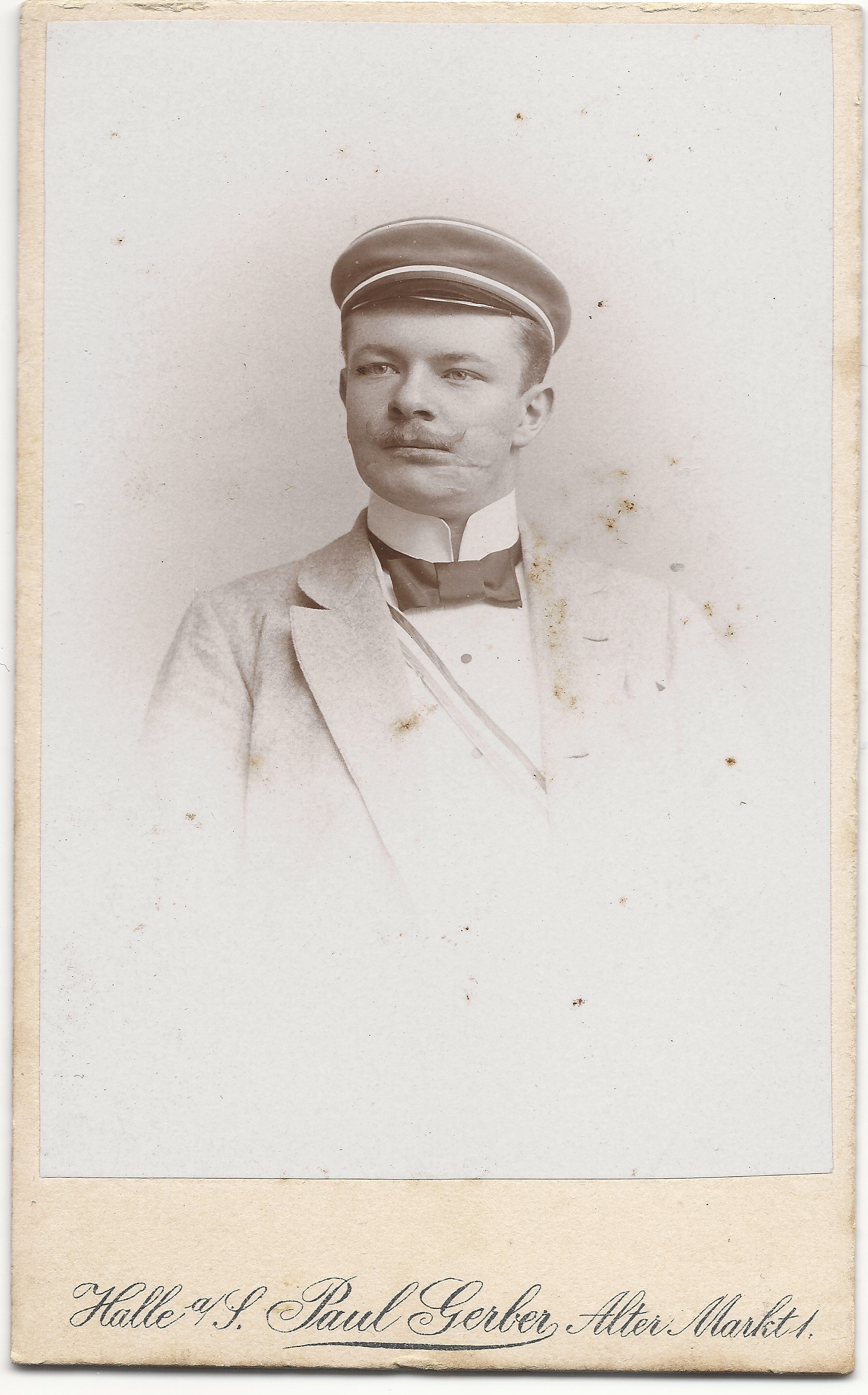 Porträtfotografie von Johannes Franz Kunze.